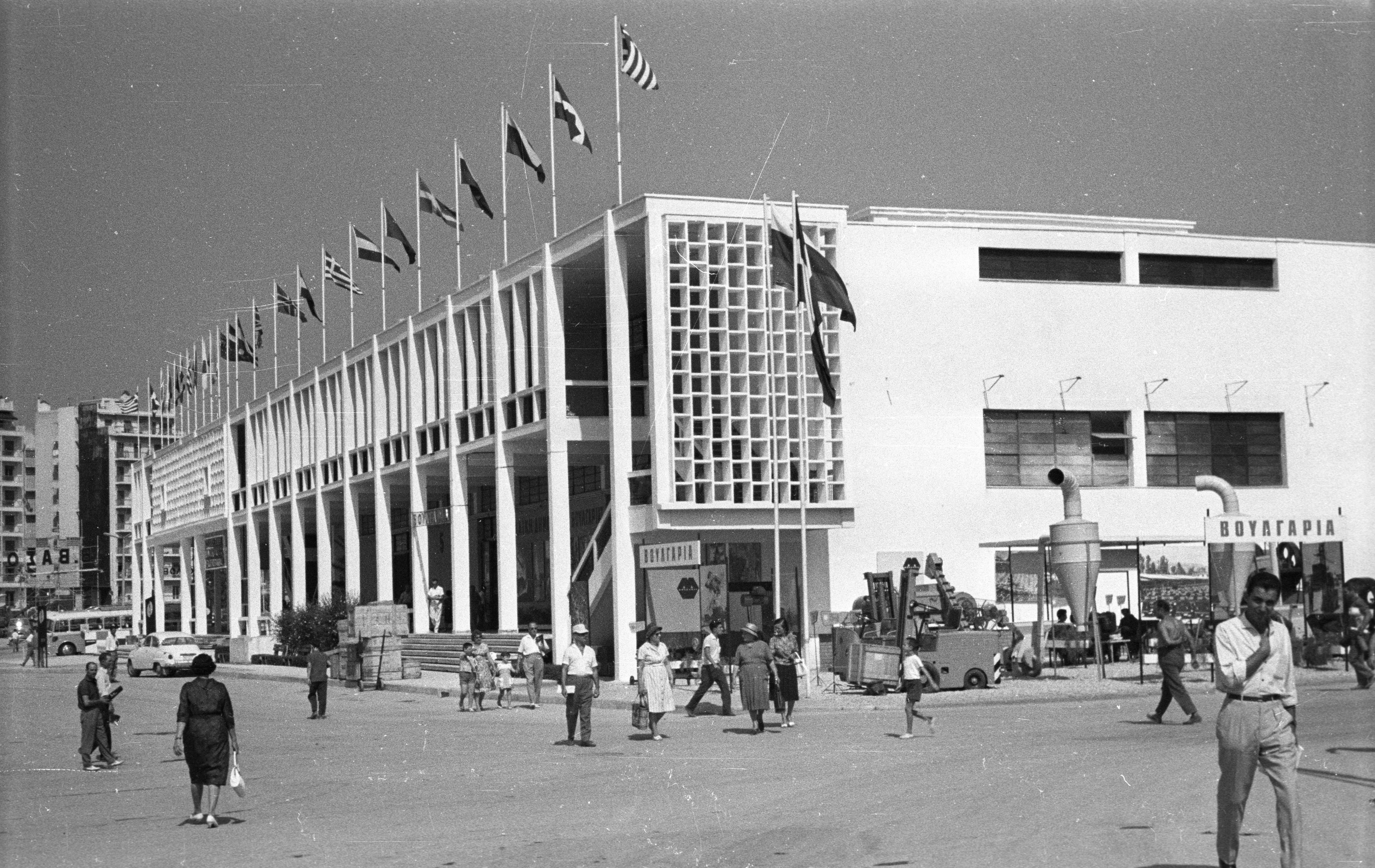 a Szaloniki Nemzetközi Vásár (ma HELEXPO) kiállítási területe. Location: Greece, Thessaloniki Tags: international fair, Greek alphabet Title: a Szaloniki Nemzetközi Vásár (ma HELEXPO) kiállítási területe.